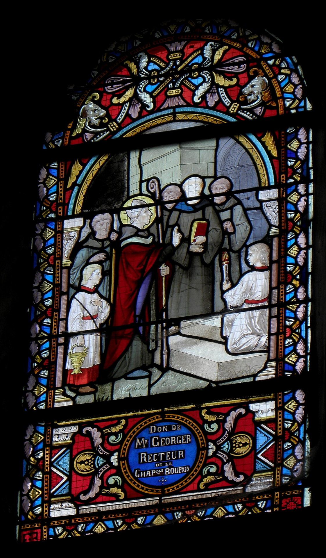 Vitrail de l'église Saint-Maxent de Maxent (35). Saint-Maxent.